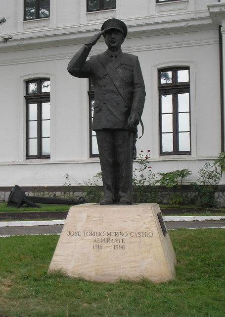 Estatua del almirante José Toribio Merino, diagonal a la entrada del Museo Marítimo Nacional, en el cerro Artillería de Valparaíso. La escultura de 3 metros (bronces y piedra) es obra del escultor chileno Arturo Hevia.